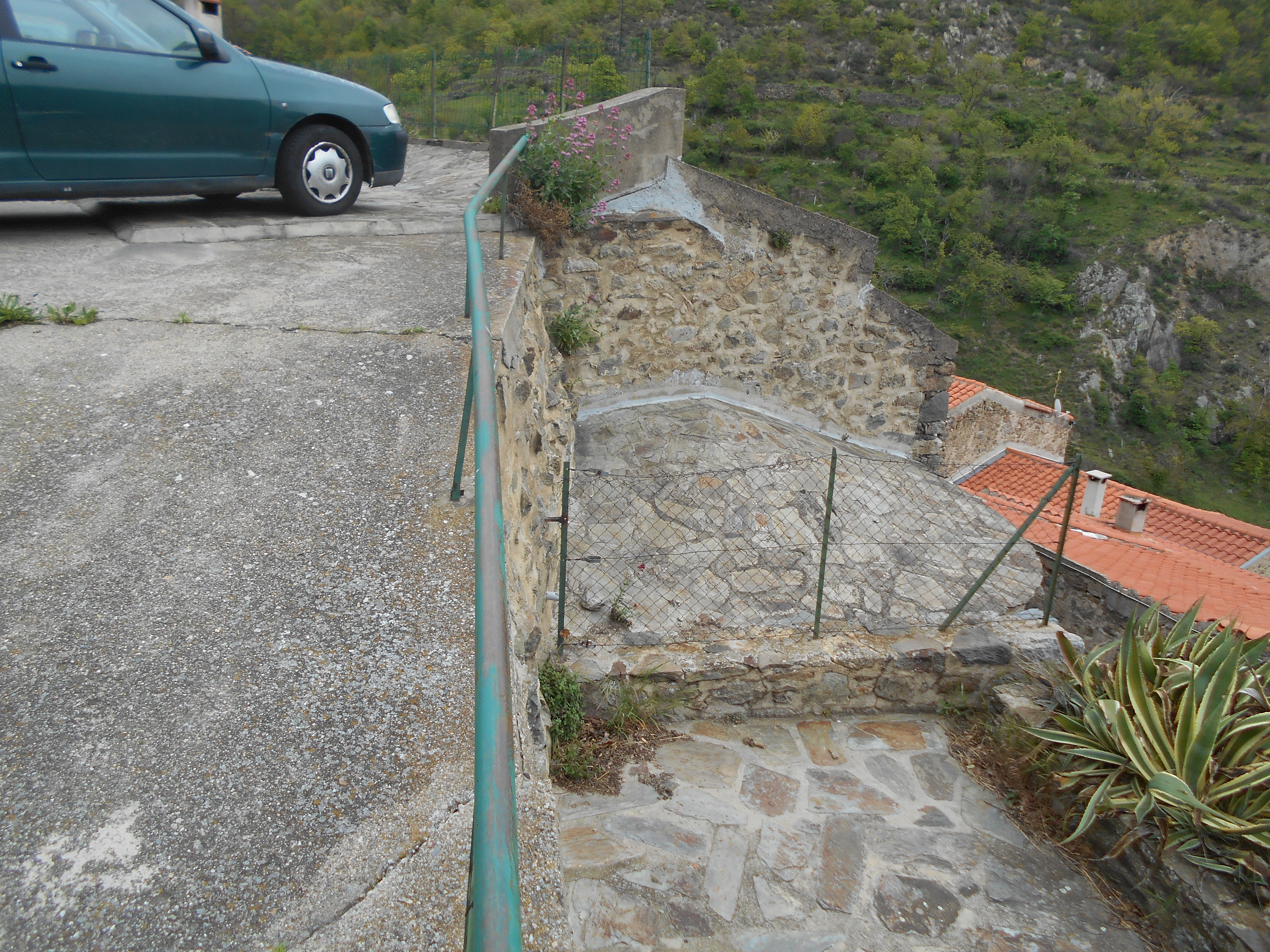 Santa Maria de Vedrinyans, a Mosset